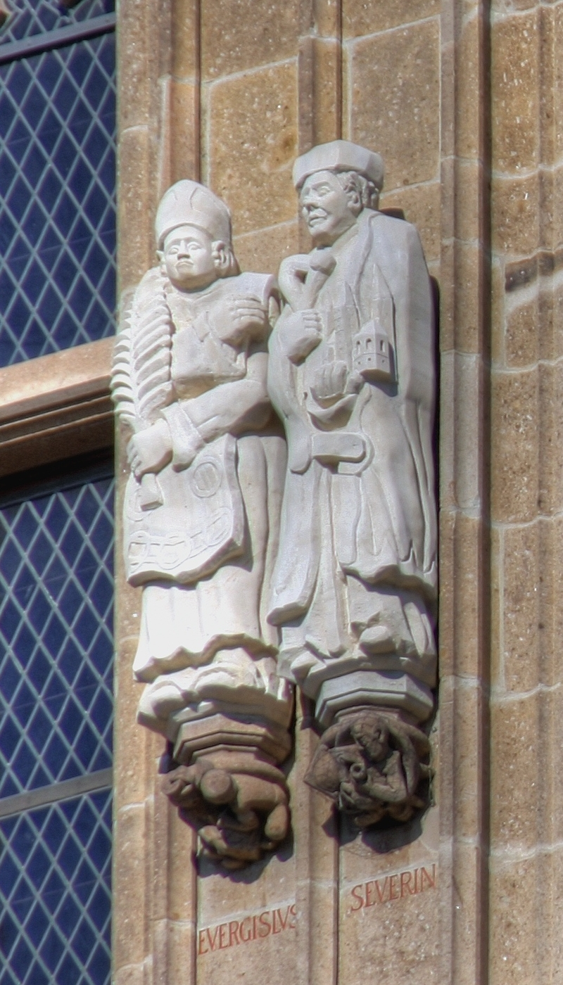 Rathausturm Köln mit den Figuren: Evergislus - Severin - Jabbek - Maternus - Ursula.